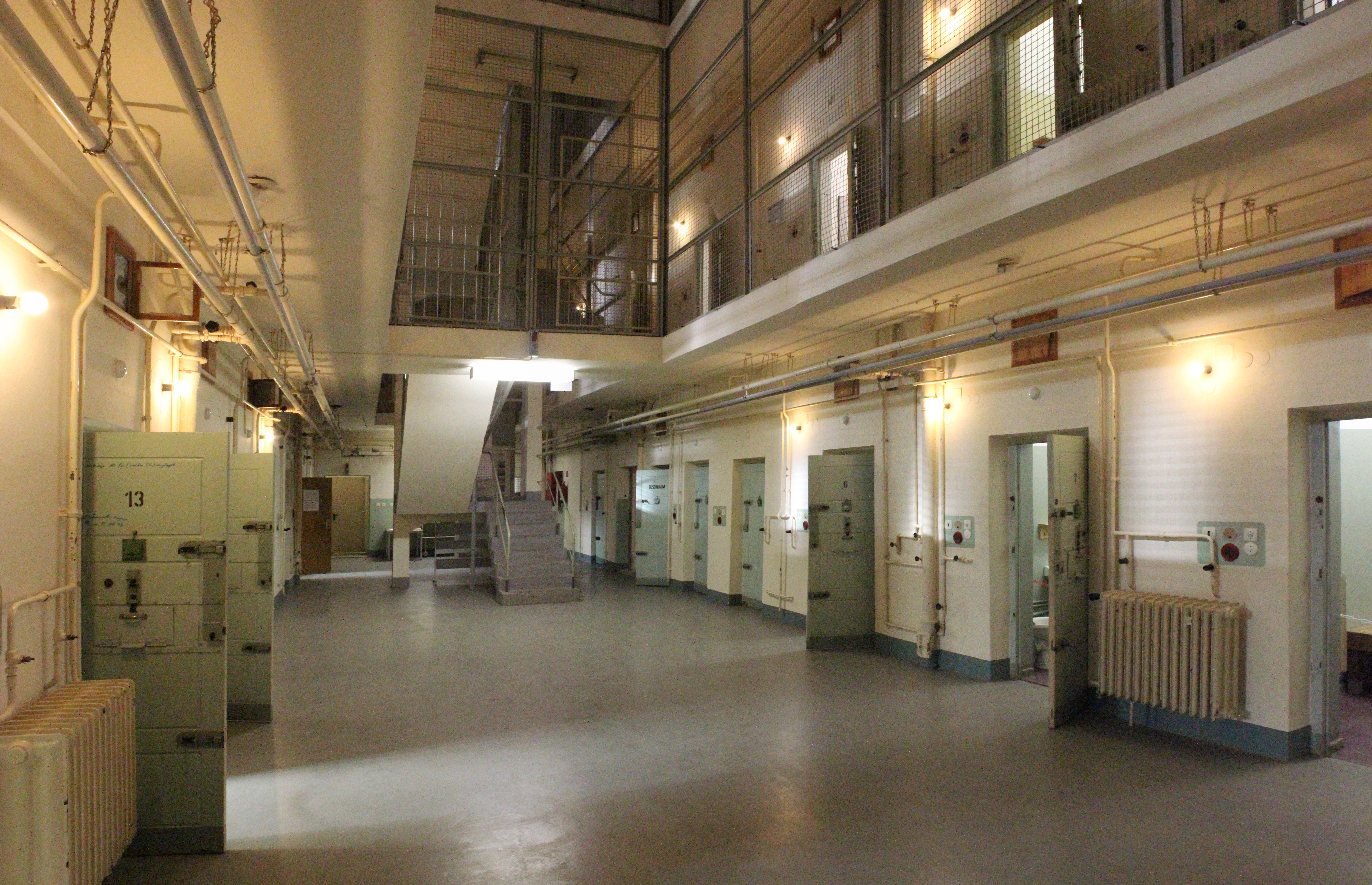 Zellentrakt in der Untersuchungshaftanstalt des Ministeriums für Staatssicherheit in der Gedenkstätte Bautzner Straße Dresden